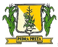 Brasão do município de Pedra Preta, estado do Rio Grande do Norte, Brasil.